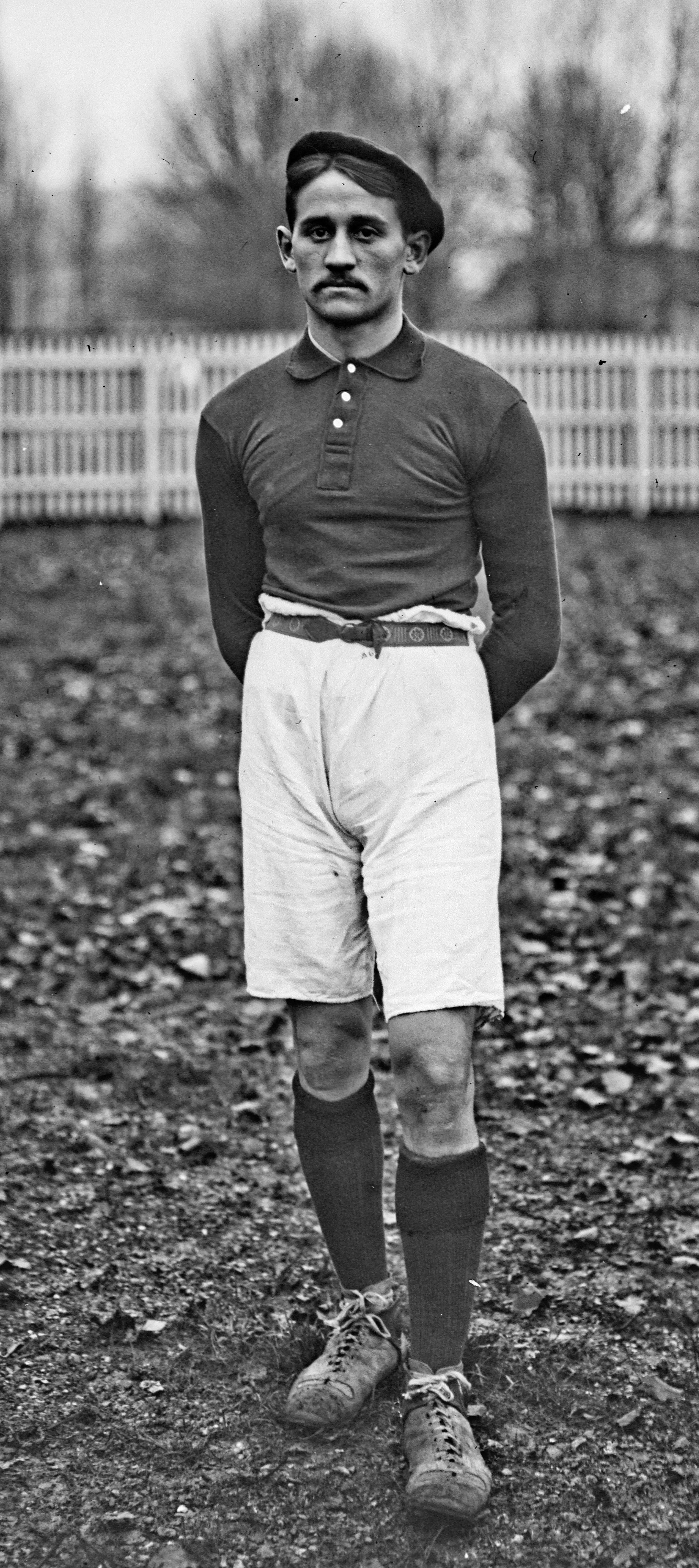 3-12-11, Colombes, rugby, Paris contre Pays basque, Guichemerre, capitaine du Pays basque.